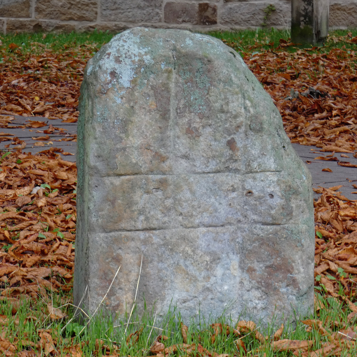 Die Kreuzsteine, oder früher die 5 Steine, sind eine Gruppe von Kreuzsteinen in Hiddestorf, einem Stadtteil von Hemmingen in der Region Hannover in Niedersachsen